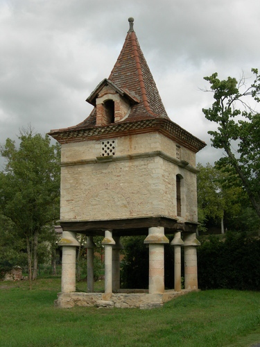 Pigeonnier du Pradinas à "La Bastide-de-Lévis" Tarn Fr